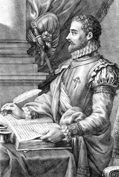 Alonso de Ercilla y Zúñiga (Madrid, 7 de agosto 1533- 29 de noviembre 1594). Poeta español, autor de La Araucana.